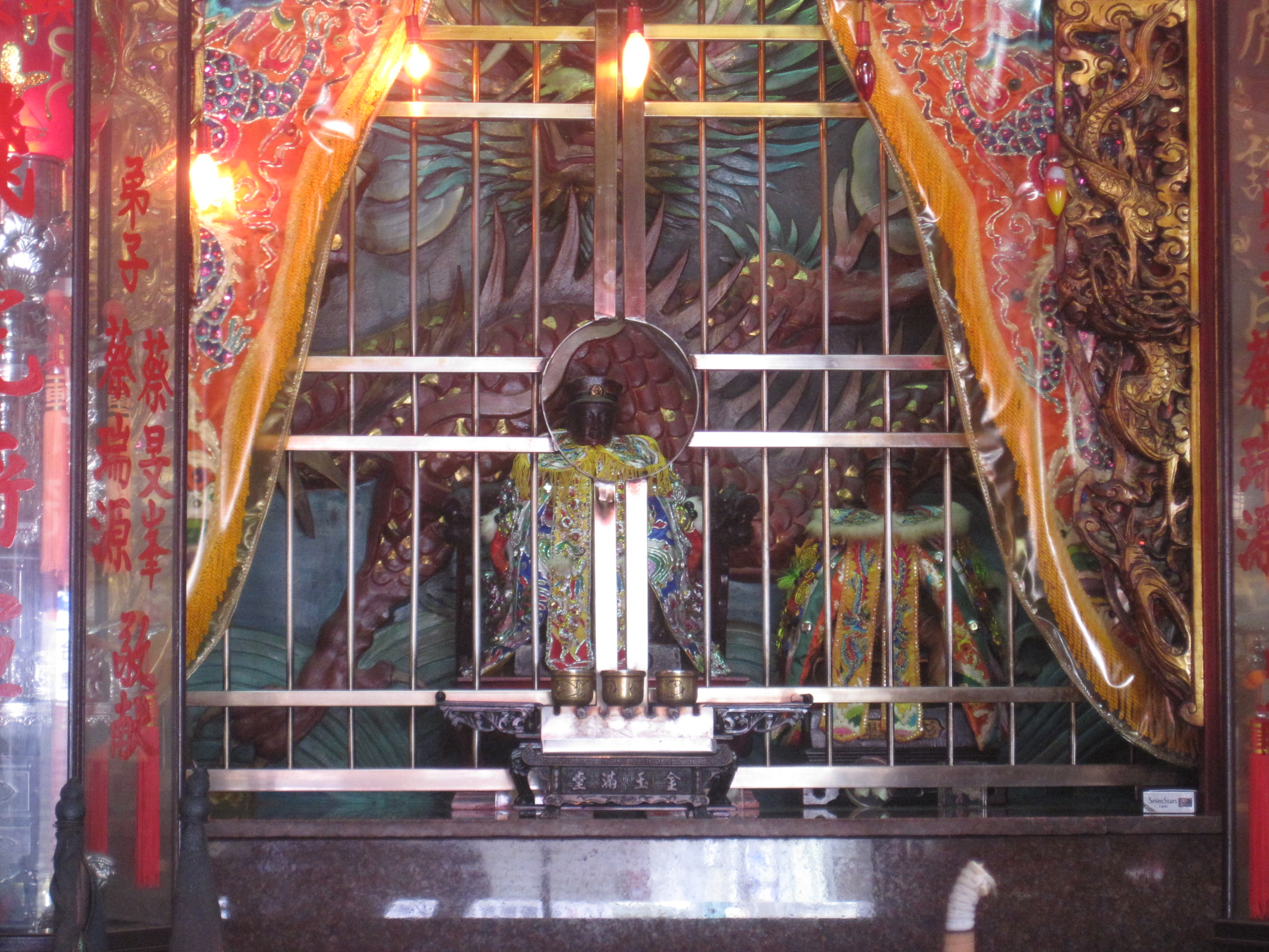 飛虎將軍廟神龕